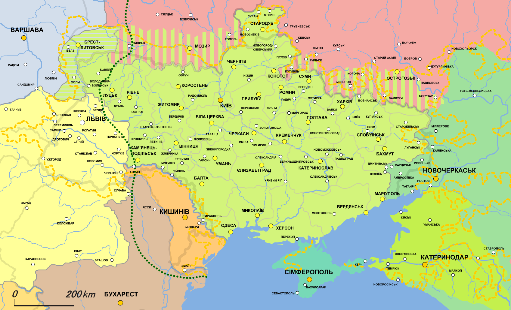 Карта Української Народної Республіки (1918.II) УНР за Брест-Литовським договором) Спірні території Межі проживання українців Межі просування німецько-австрійських військ восени 1917 ≡≡≡≡≡ Підляшшя, передане УНР за умовами Брест-Литовського договору Радянська Росія Донський крайовий уряд генерала Краснова Кубанський крайовий уряд Кримсько-татарський уряд Австро-Угорська Імперія Польська регентська рада Румунське королівство Молдавська народна республіка Сербія